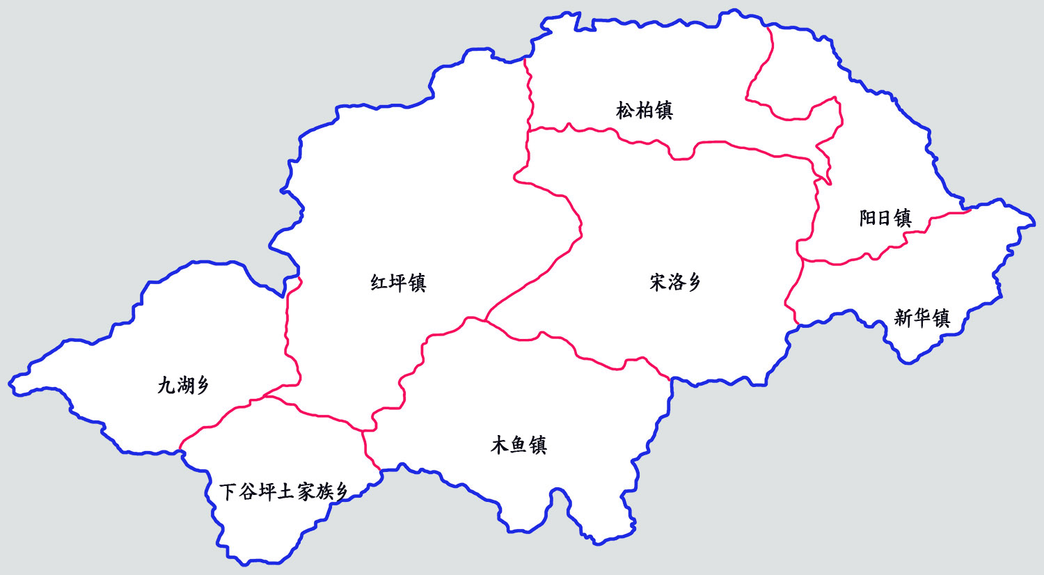 선능자림구 행정구역